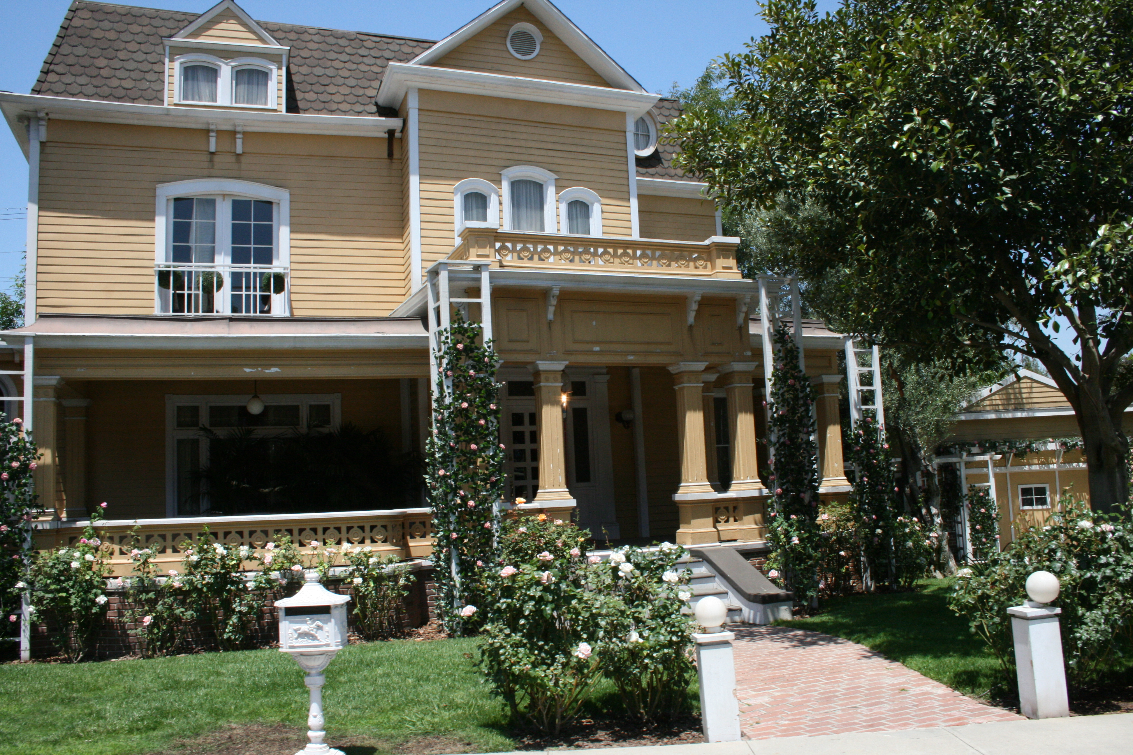 4349 Wisteria Lane (Solisien koti).